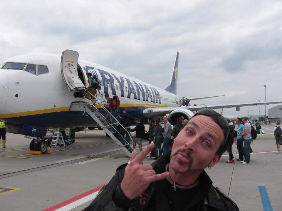 BOOL geht auf Promotour Auf dem Foto Jens Geilert (Drummer)